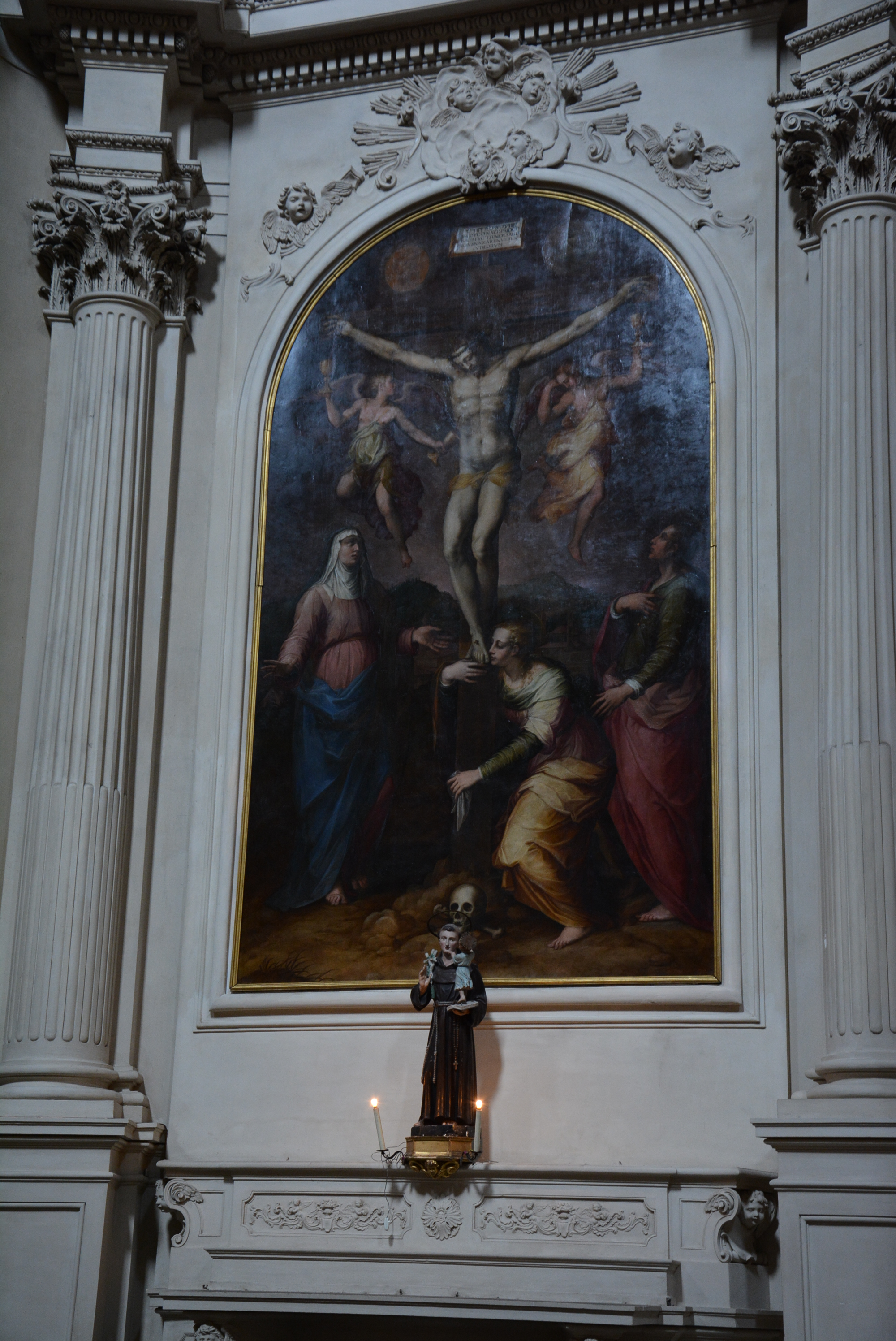 Basilica di Santa Maria del Carmine a Firenze